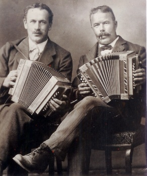 Balz Schmidig und Josef Stump als Bergeörkapelle Balz Schmididg, Oberschönenbuch Schwyz ca 1919-1929